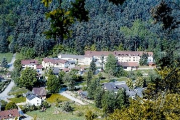 Hier sieht man die Kaminkehrerschule in Mühlbach.